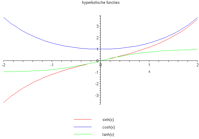 hyperbolische functies zelfgemaakt in Maple